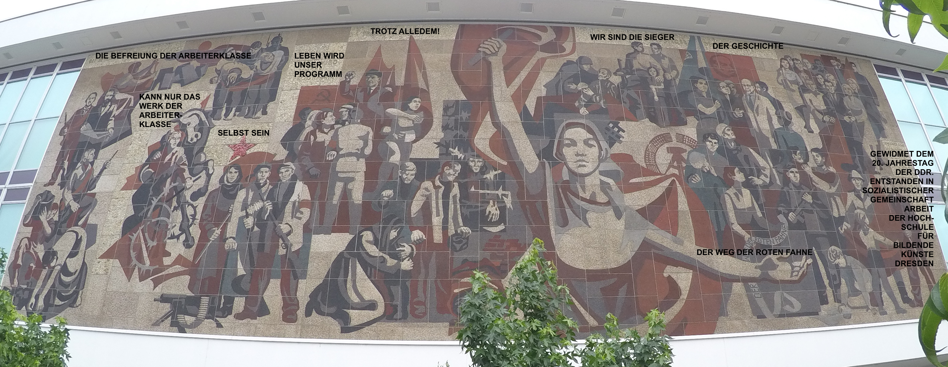 Inschriften des Wandbildes "Der Weg der Roten Fahne" an der Westseite des Dresdner Kulturpalastes